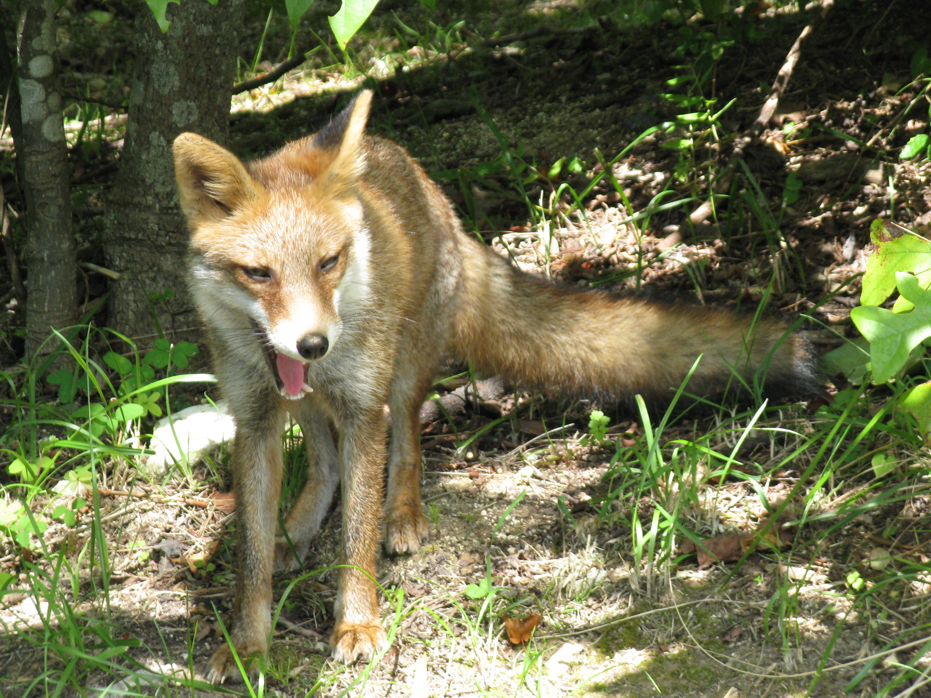 Vulpes vulpes japonica